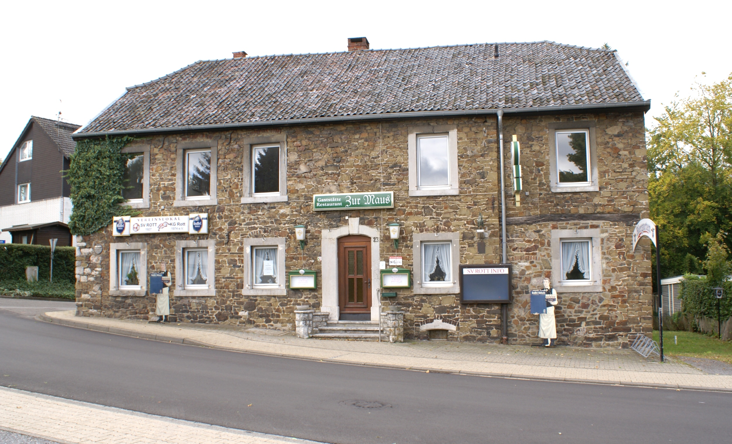 Roetgen-Rott Quirinisstrasse 23This is a photograph of an architectural monument., no. 6